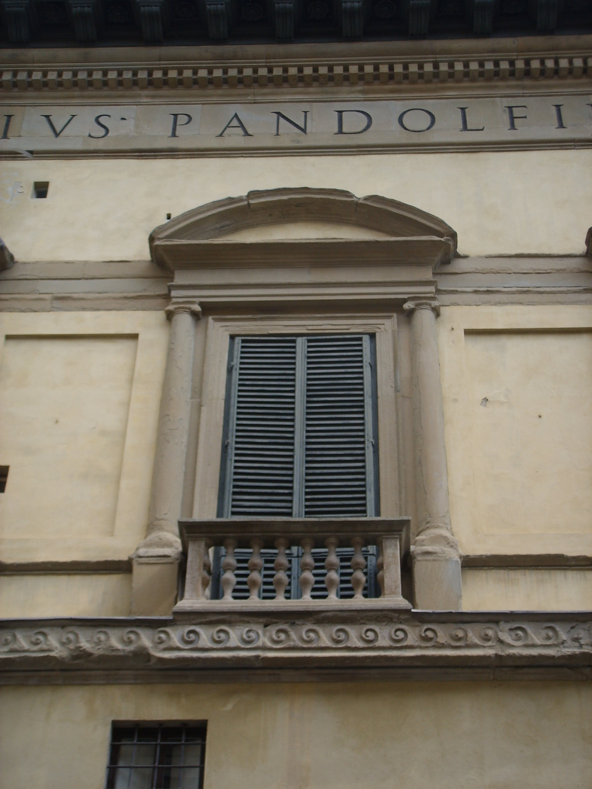 Palazzo Pandolfini, dettaglio